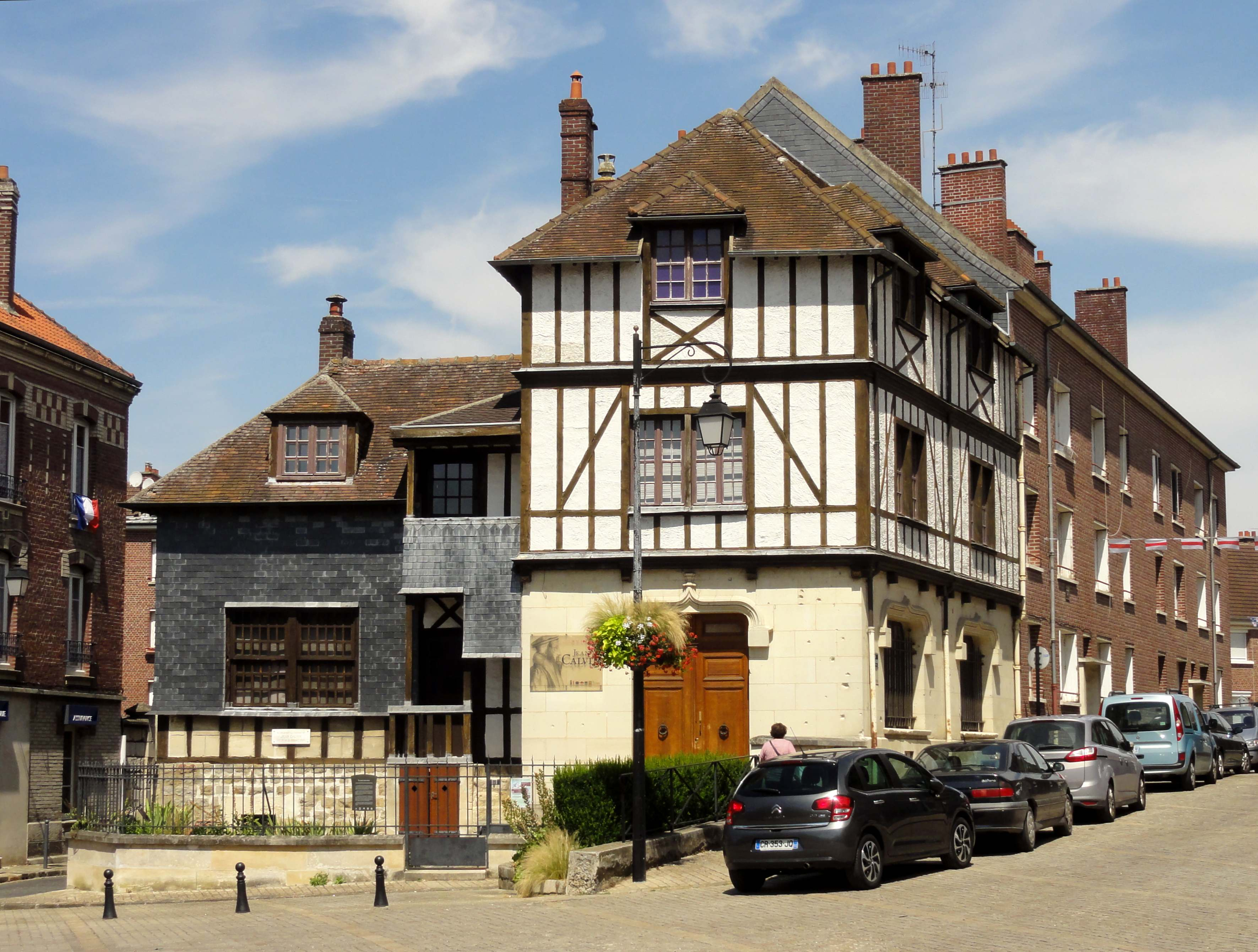 Musée Jean-Calvin, 6 place Aristide Briand. Construit de 1927 à 1930 par l’architecte Charles Letrosne, à l’initiative de la Société d’histoire du protestantisme à l’emplacement supposé de la maison natale du réformateur.